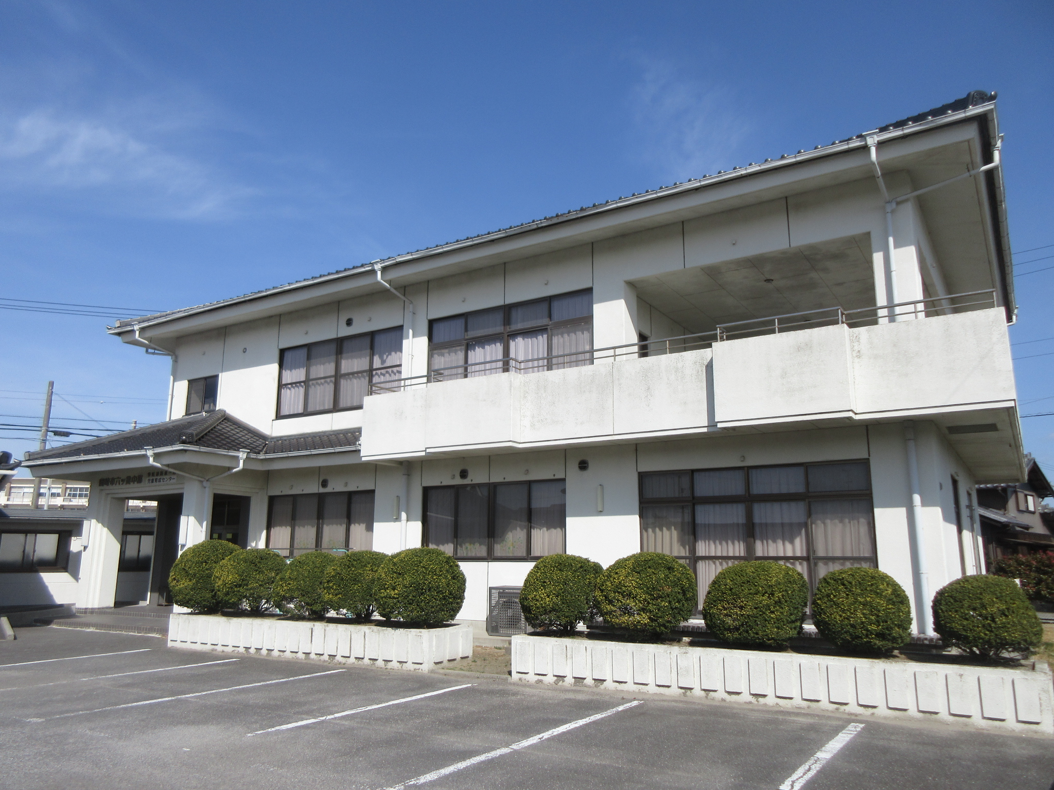 六ツ美中部学区市民ホーム（岡崎市下青野町）